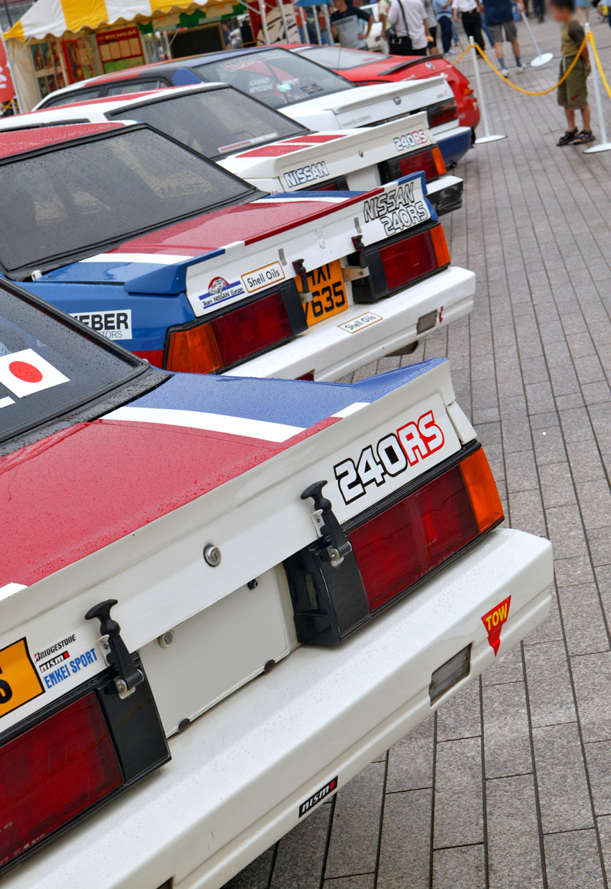 Nissan 240RS ( BS110 )